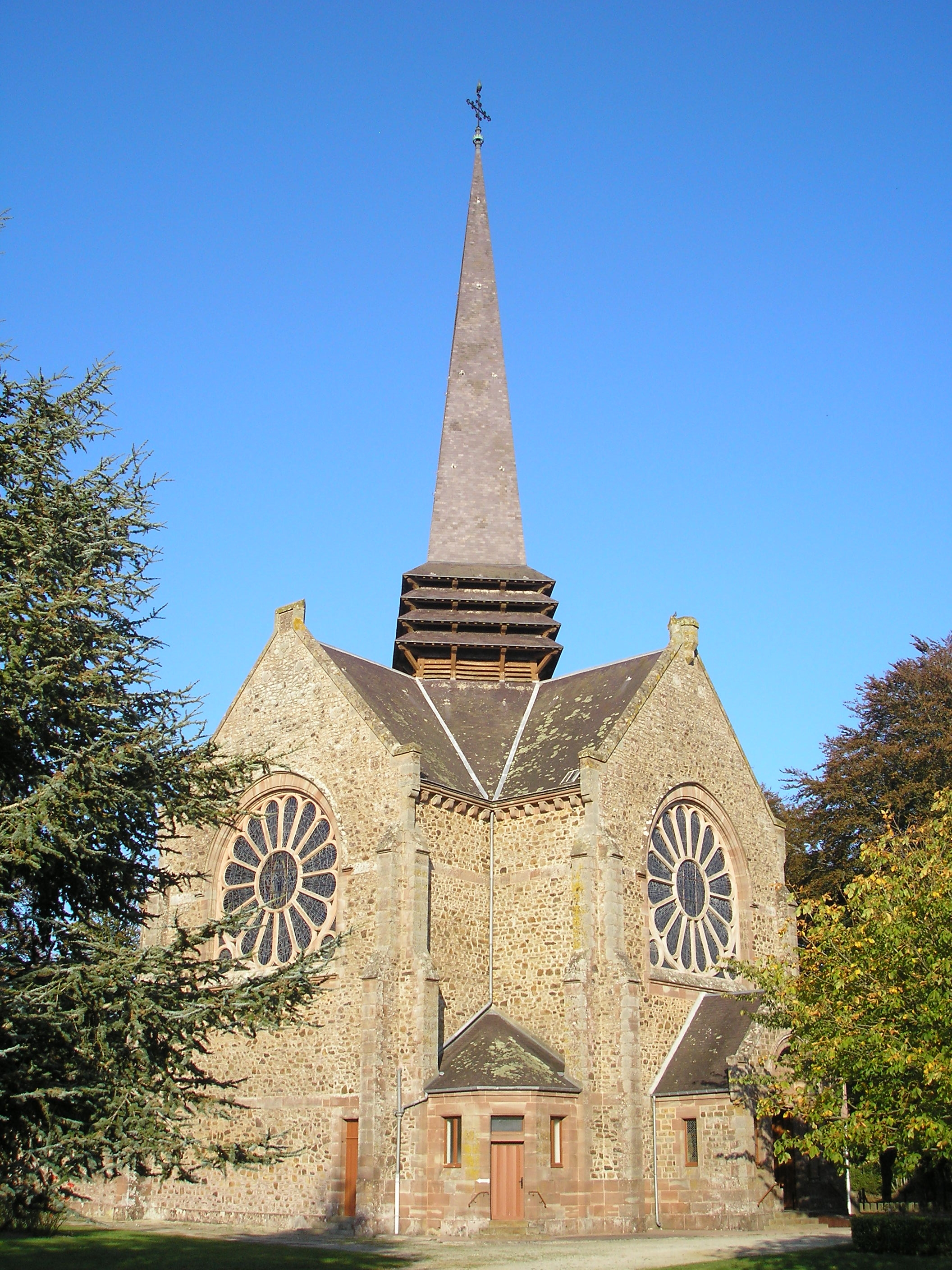 Passais (Normandie, France). Grande chapelle Notre-Dame de l'Oratoire.